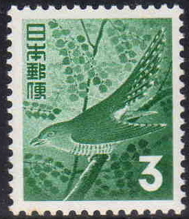 日本の3円普通切手。1971年にローマ字国名を入れた切手が発行されるまで日本国内の郵便局で在庫があるかぎり発売されていた。